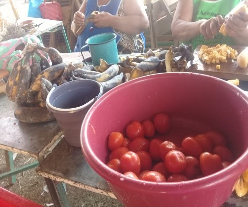 la venta